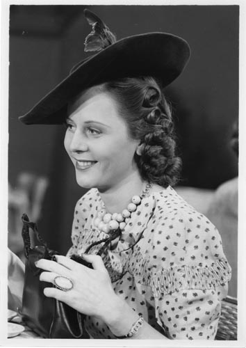 Aída Luz en "Cuando canta el corazón" (1941).